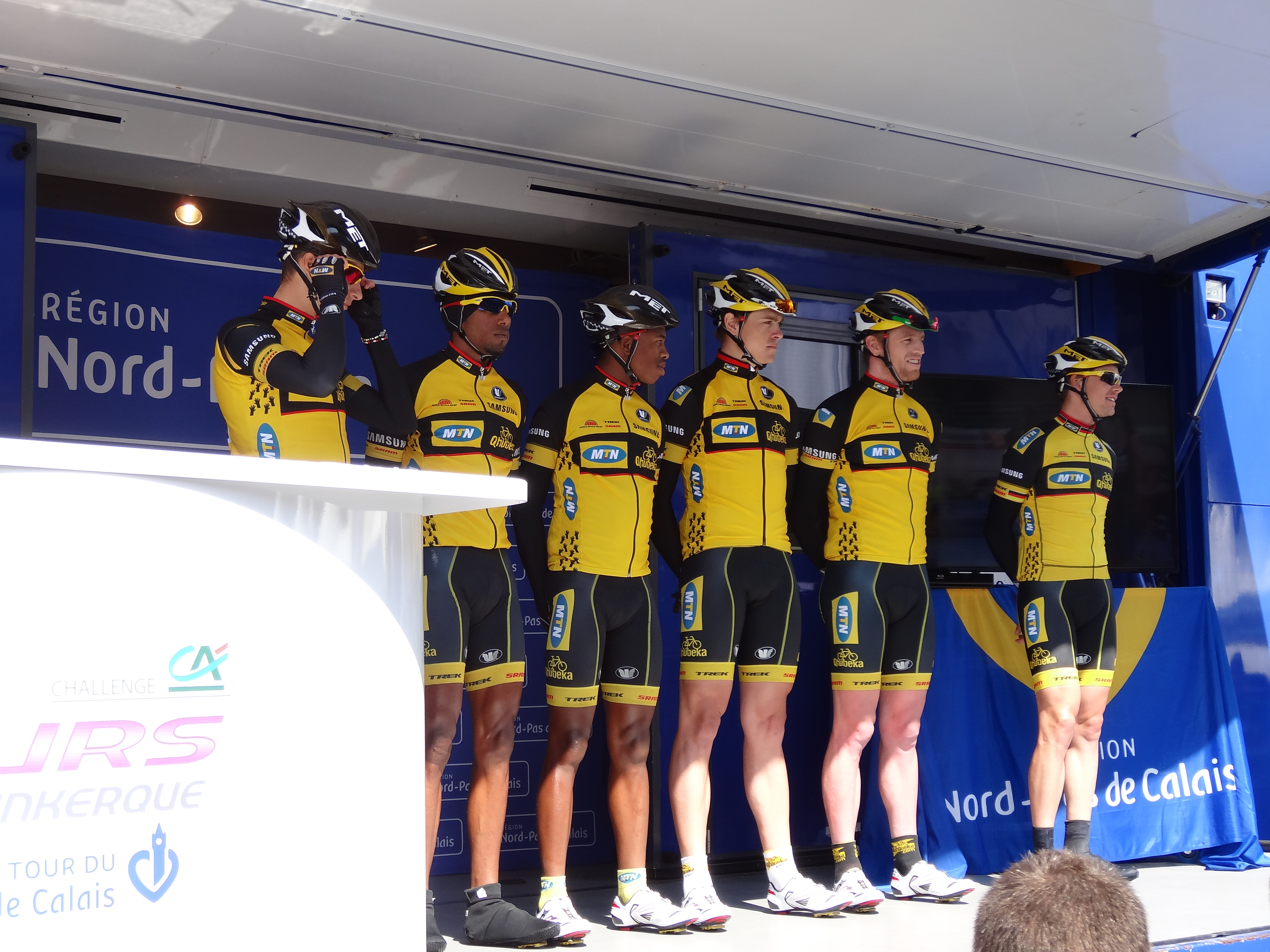 Reportage photographique réalisé le mercredi 1er mai 2013 au départ de la première étape de l'édition 2013 des Quatre jours de Dunkerque à Dunkerque, Nord, Nord-Pas-de-Calais, France. Le dossier photographique montre des véhicules de course exposés, la caravane publicitaire, la présentation des coureurs, et le départ. Ce fichier représente un ou plusieurs coureurs cyclistes que JÄNNICK Jérémy n'est pas parvenu à identifier, ou n'a pas eu le temps de le faire. Si vous le reconnaissez, supprimez Quatre jours de Dunkerque 2013|Cycliste non identifié et remplacez le par Depicted person|1= :Category: | et placez Category: en bas de page. Si vous souhaitez qu'un portrait soit généré à partir de cette image, contactez son auteur qui s'en chargera, afin que ce nouveau fichier soit cohérent avec les autres réalisés. Des notes peuvent être utiles pour identifier précisément chaque personne.